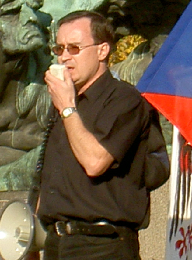 Tomáš Vandas